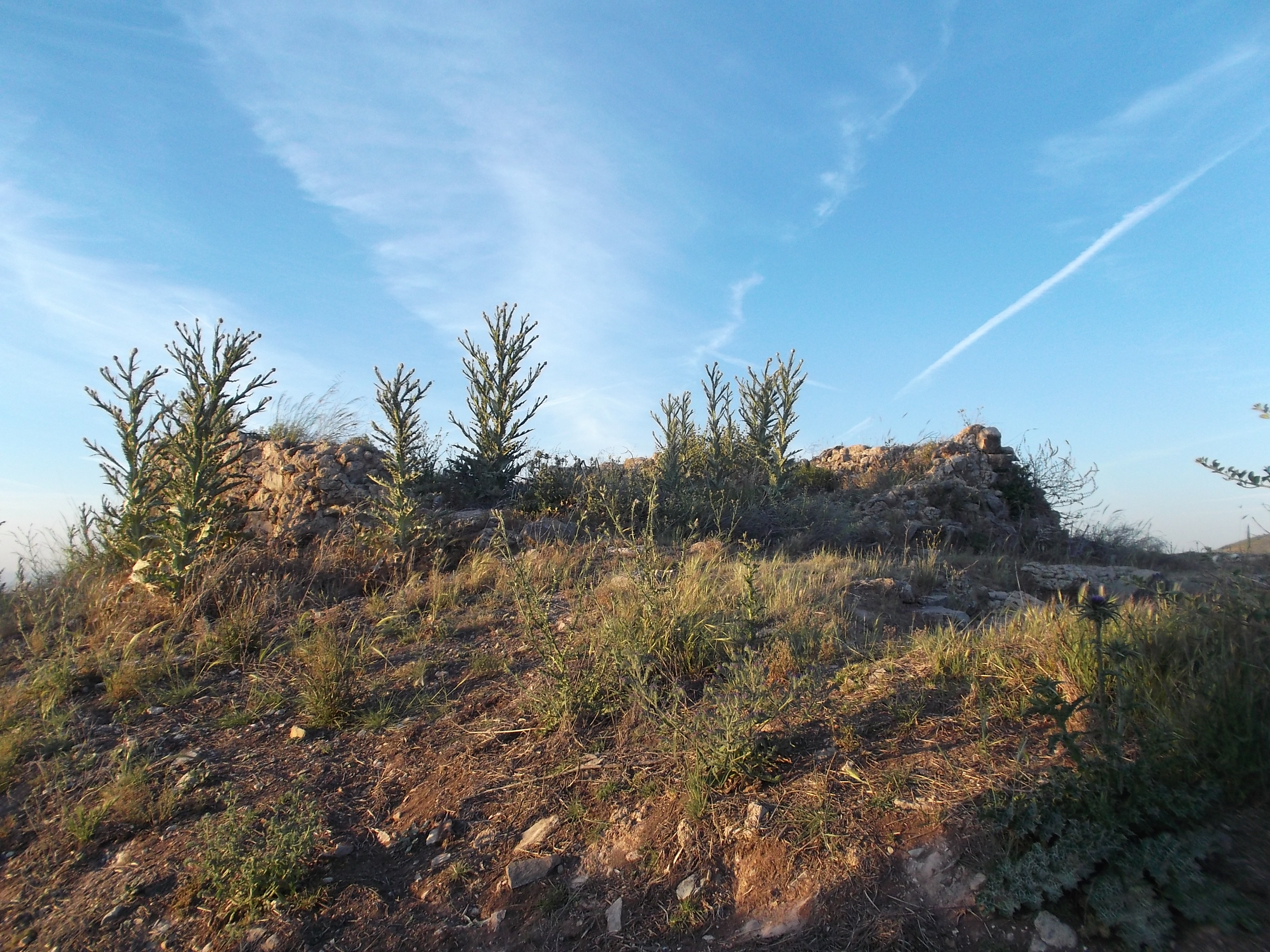 Restos de Torrechantre.